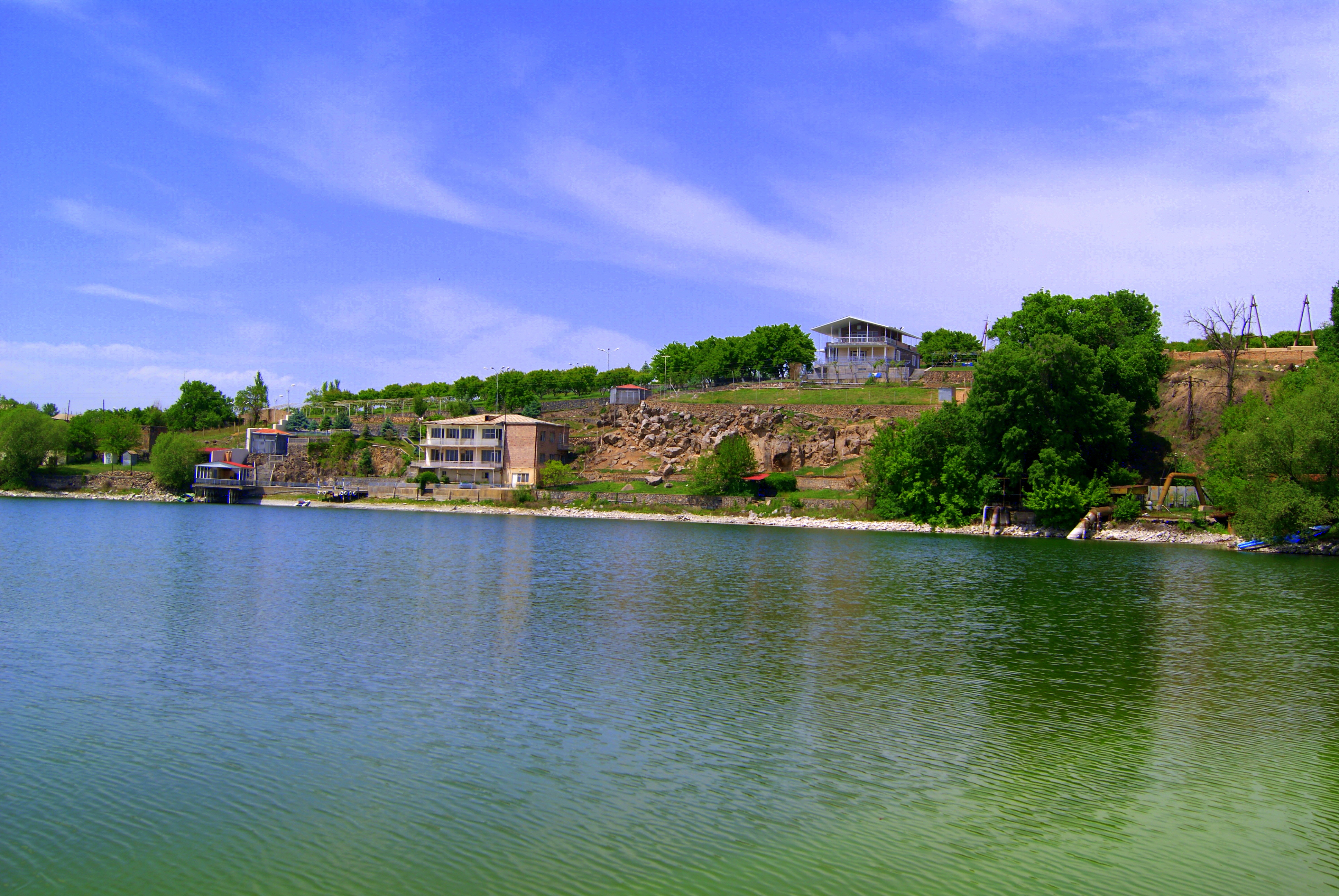 Մեծամոր լիճ, Ակնա լիճ